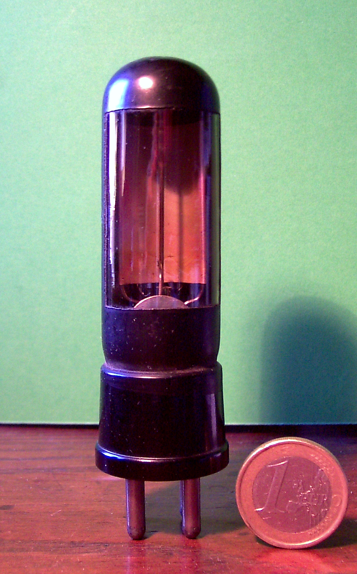 Célula fotoeléctrica